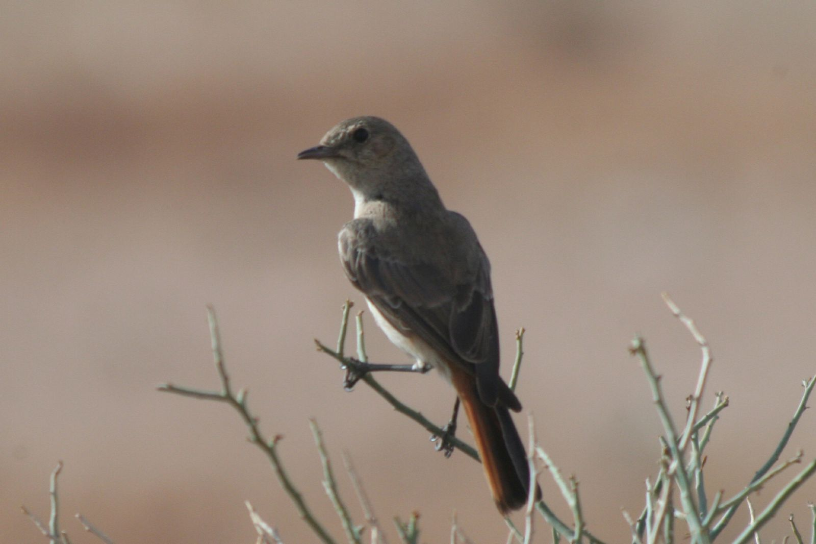 Familiar Chat (Cercomela familiaris)